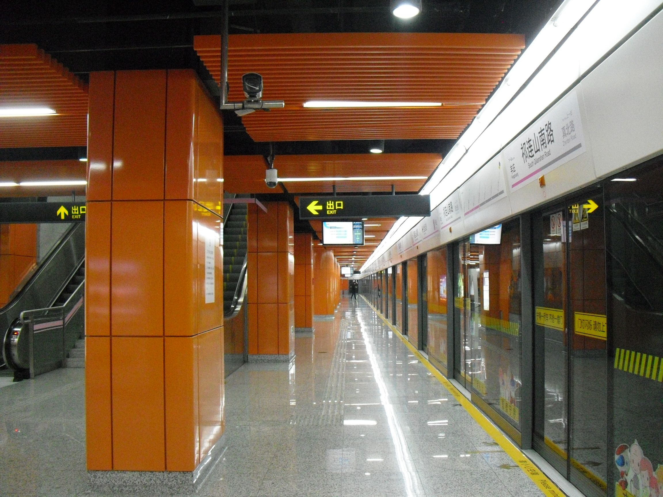 该照片摄于2014年11月23日。位于上海地铁13号线祁连山南路站站台（金运路方向）。